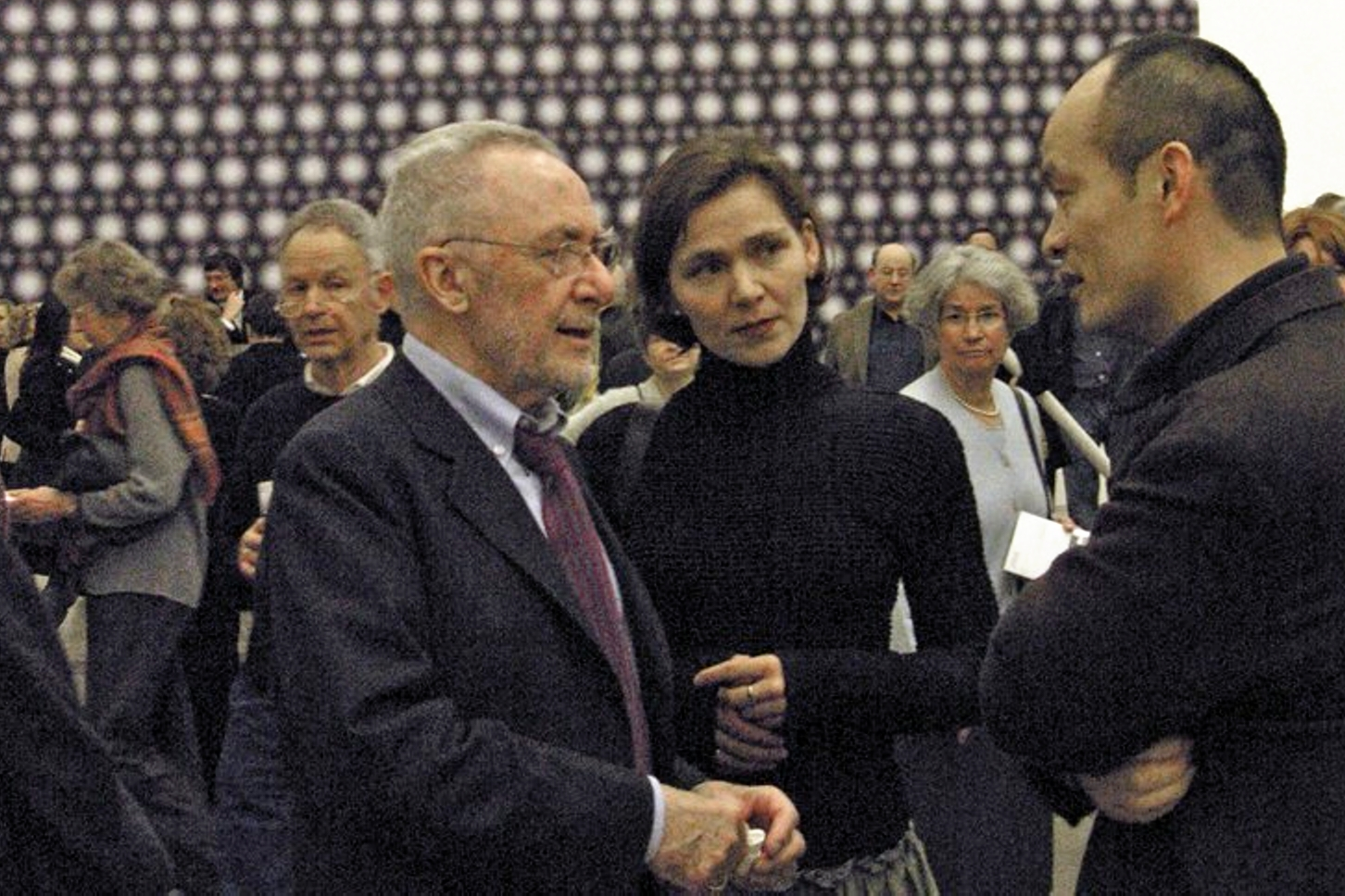 Gerhard Richter anlässlich der Eröffnung seiner Retrospektive am 11.02.2005 in Düsseldorf, K20, vor seinem Werk Strontium, 9x9m.